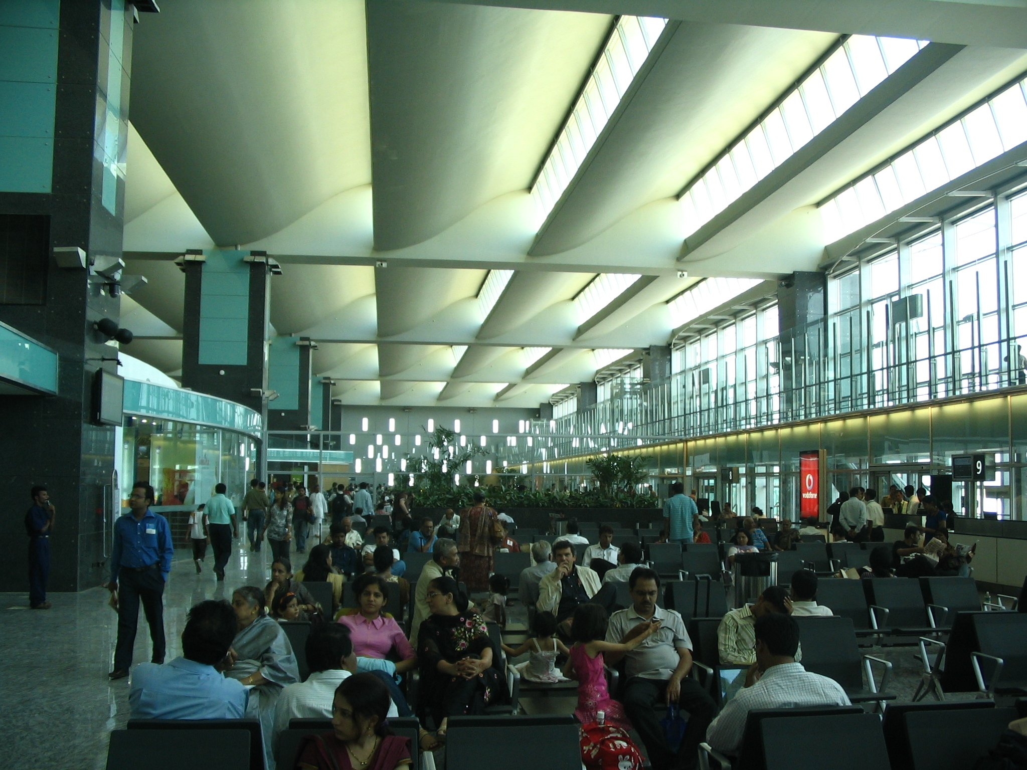 Waiting area at Bengaluru International Airport